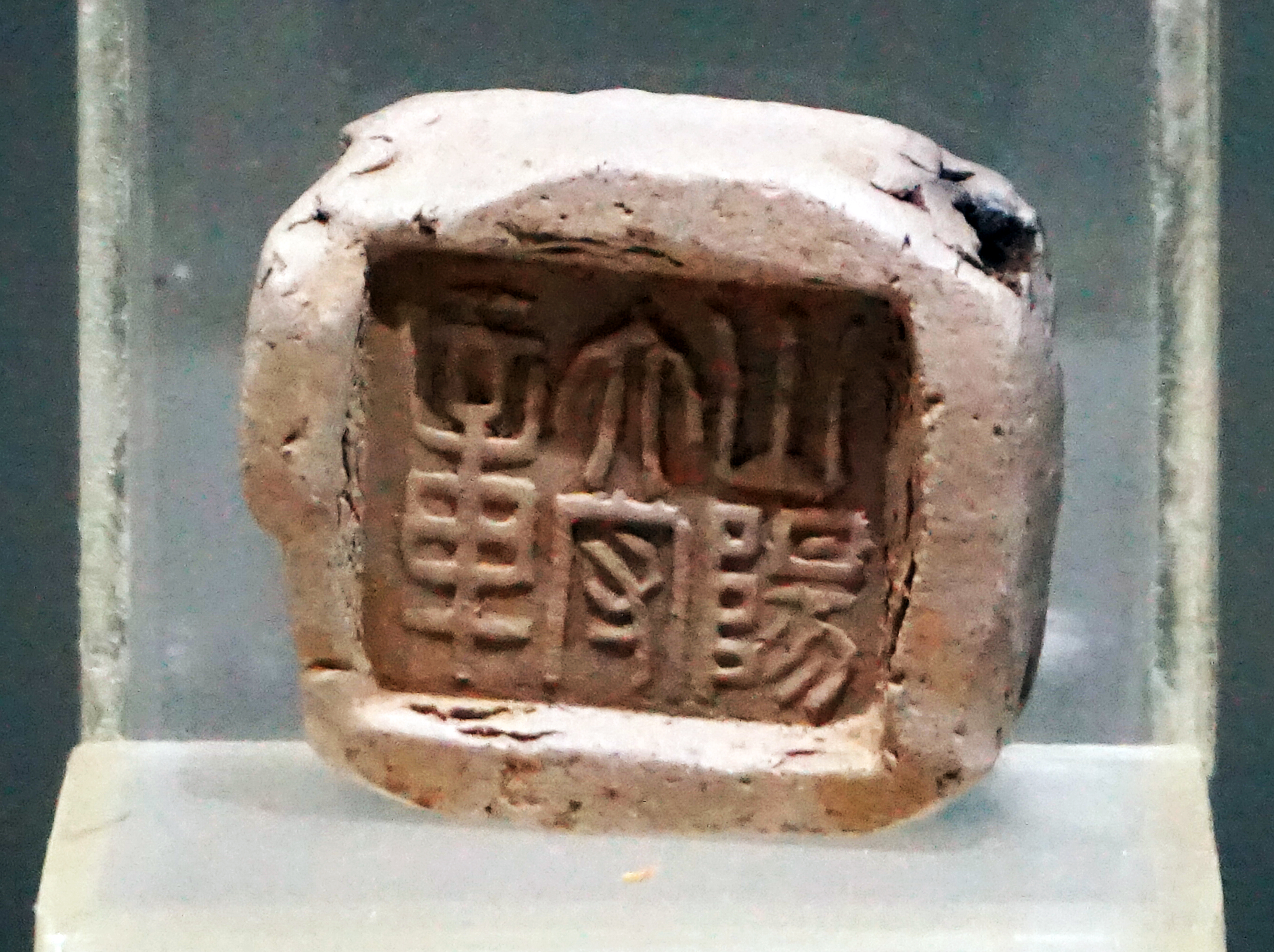 汉“山阳太守章”封泥。